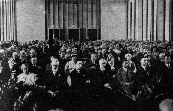 UK 1933 en Kolonjo. Festkunsido de UEA.